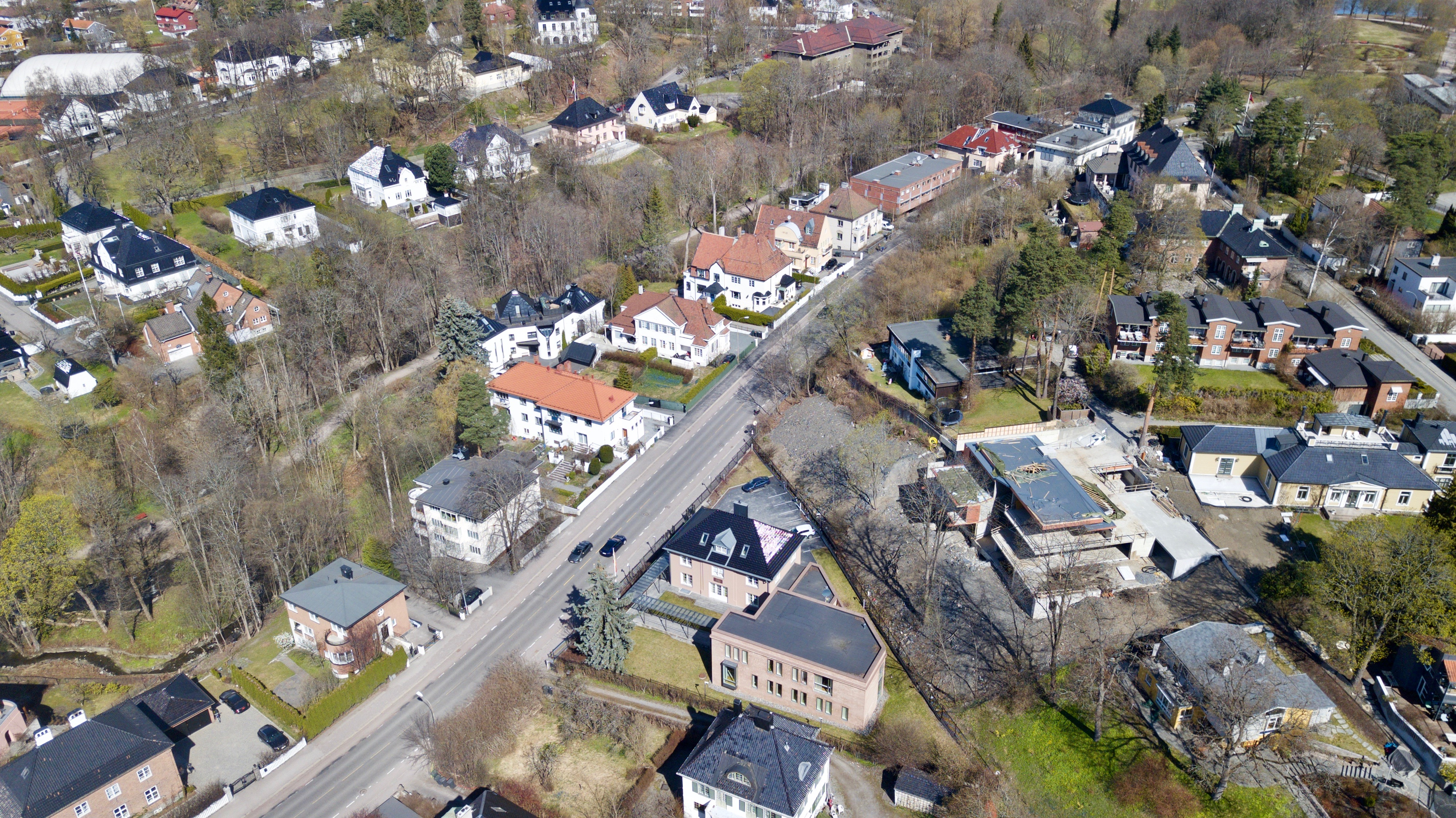 Halvdan Svartes gate. Oslo.